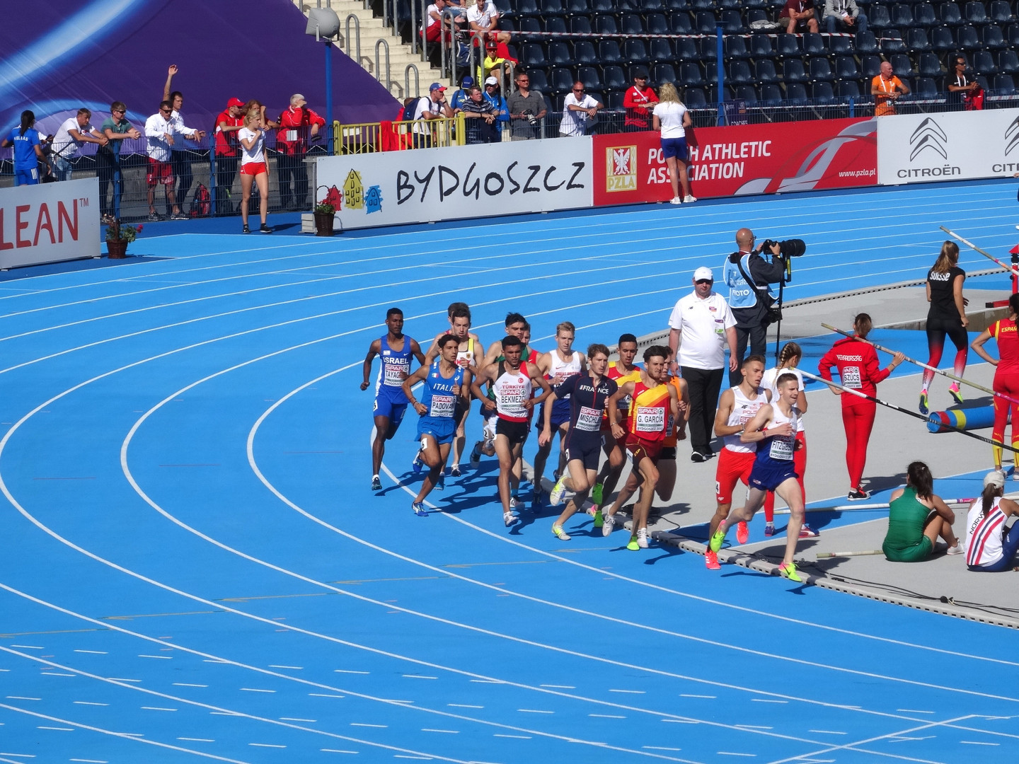 Młodzieżowe Mistrzostwa Europy w Lekkoatletyce U23 w Bydgoszczy 13-16 lipca 2017, kwalifikacje biegu na 1500 m mężczyzn